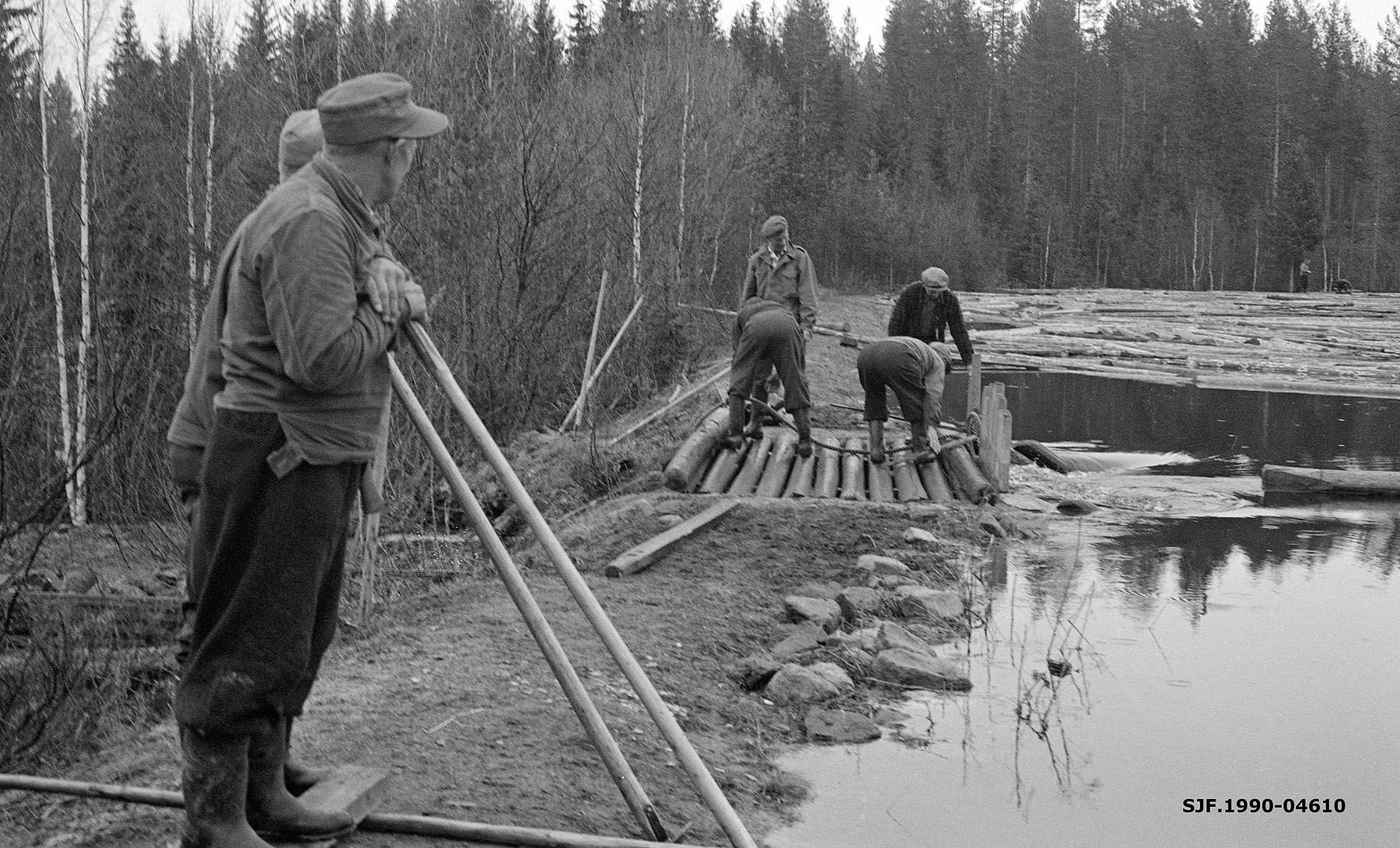 Damslipp på Gammelbuen i Ringsåsbekken, 1960